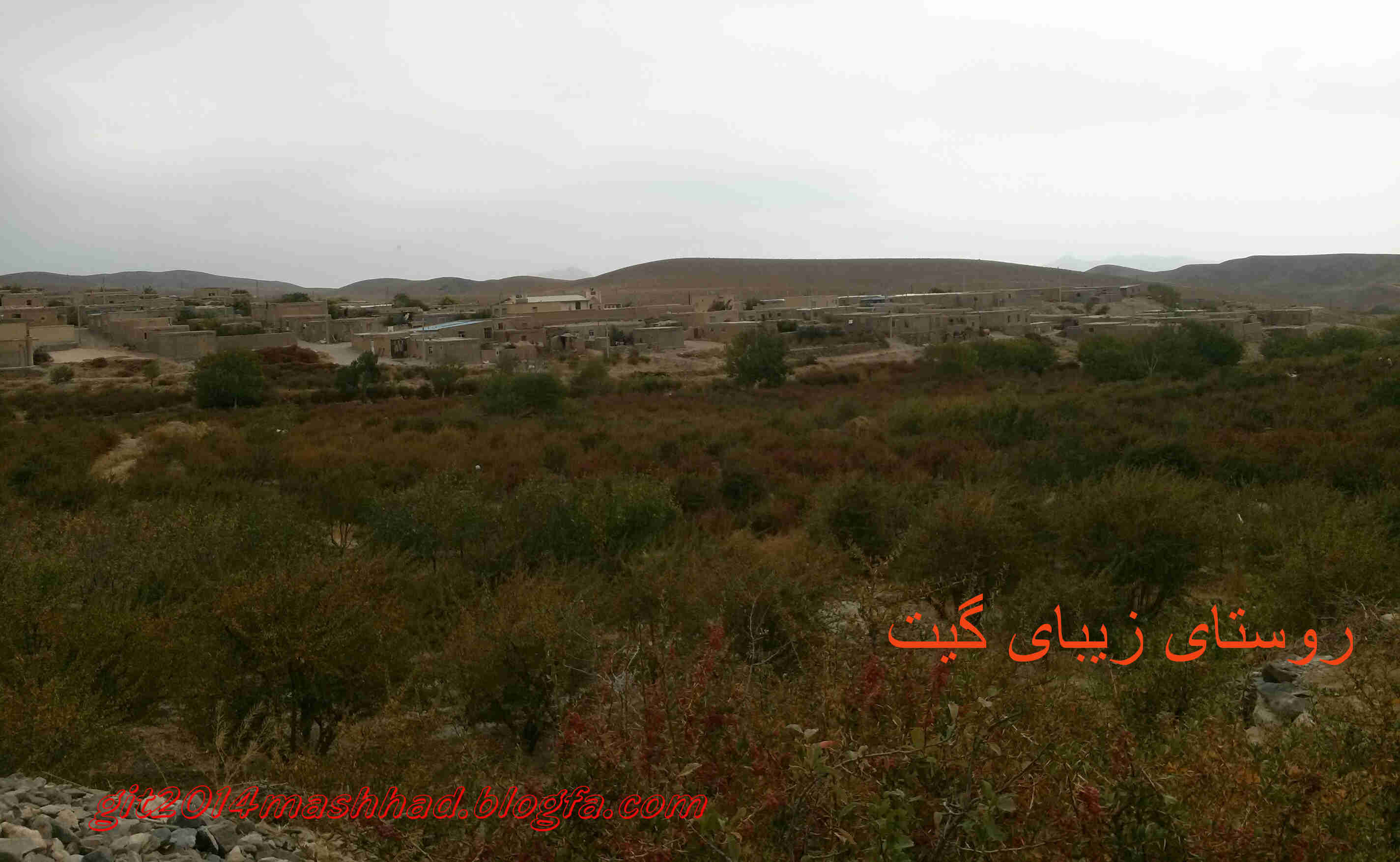 روستای زیبای گیت